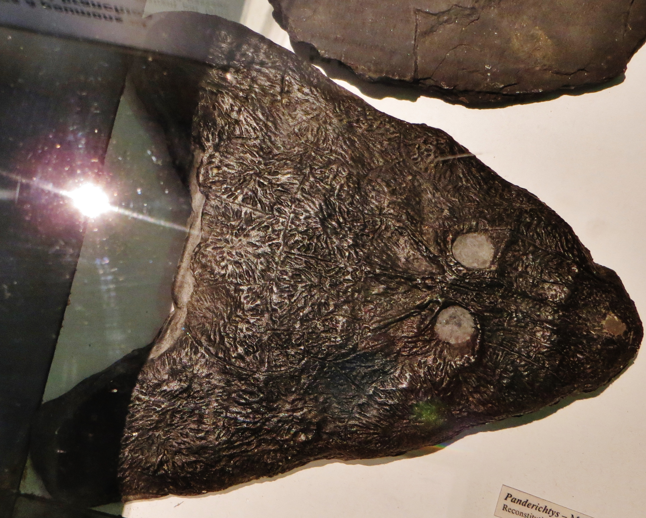 Fossil - Took the picture at Musee d'Histoire Naturelle, Lille